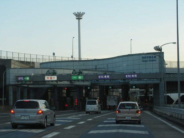 2009年8月11日、湾岸浮島本線料金所付近で撮影